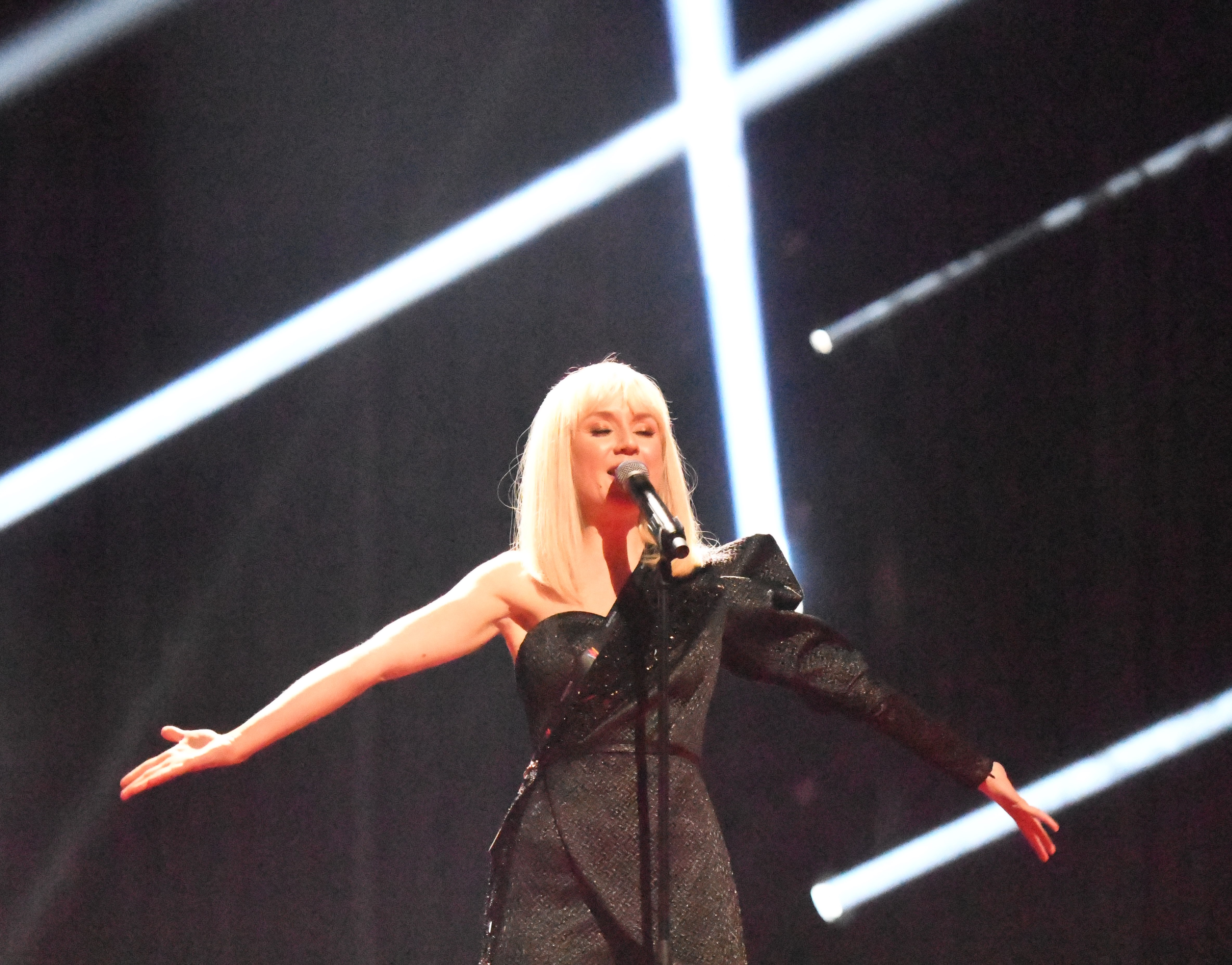 Melodifestivalen 2020, Deltävling 2, Göteborg, Anna Bergendahl